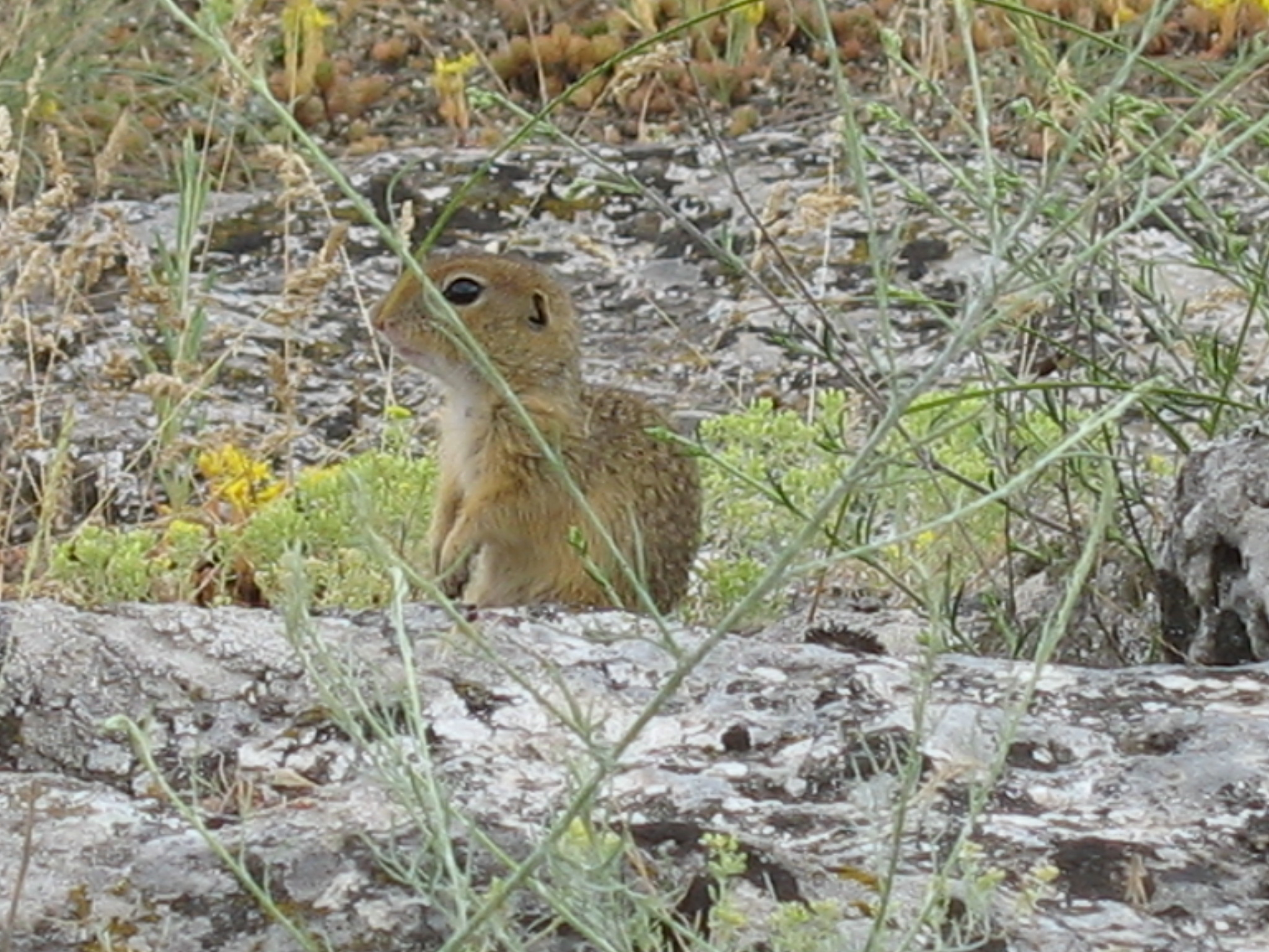 Spermophilus suslicus, Varna, Bulgaria.